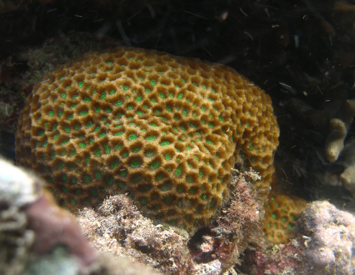 Une colonie de corail Favites pentagona à la Réunion.